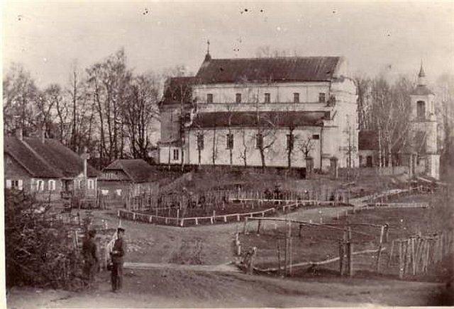 Pabiržės trečioji bažnyčia, pastatyta 1772 m.